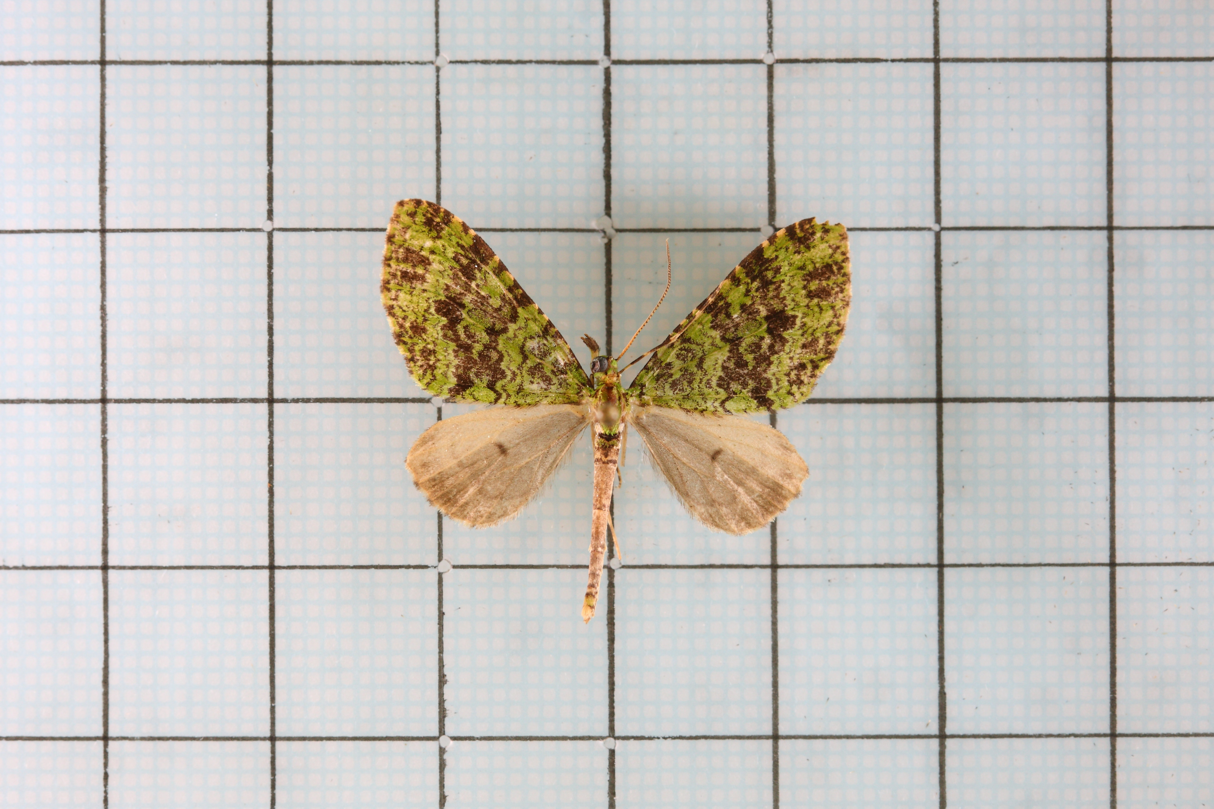 Tristeirometa decussata moltrechti (Prout) 綠波尺蛾 鞍1:P.45,Pl.11-26